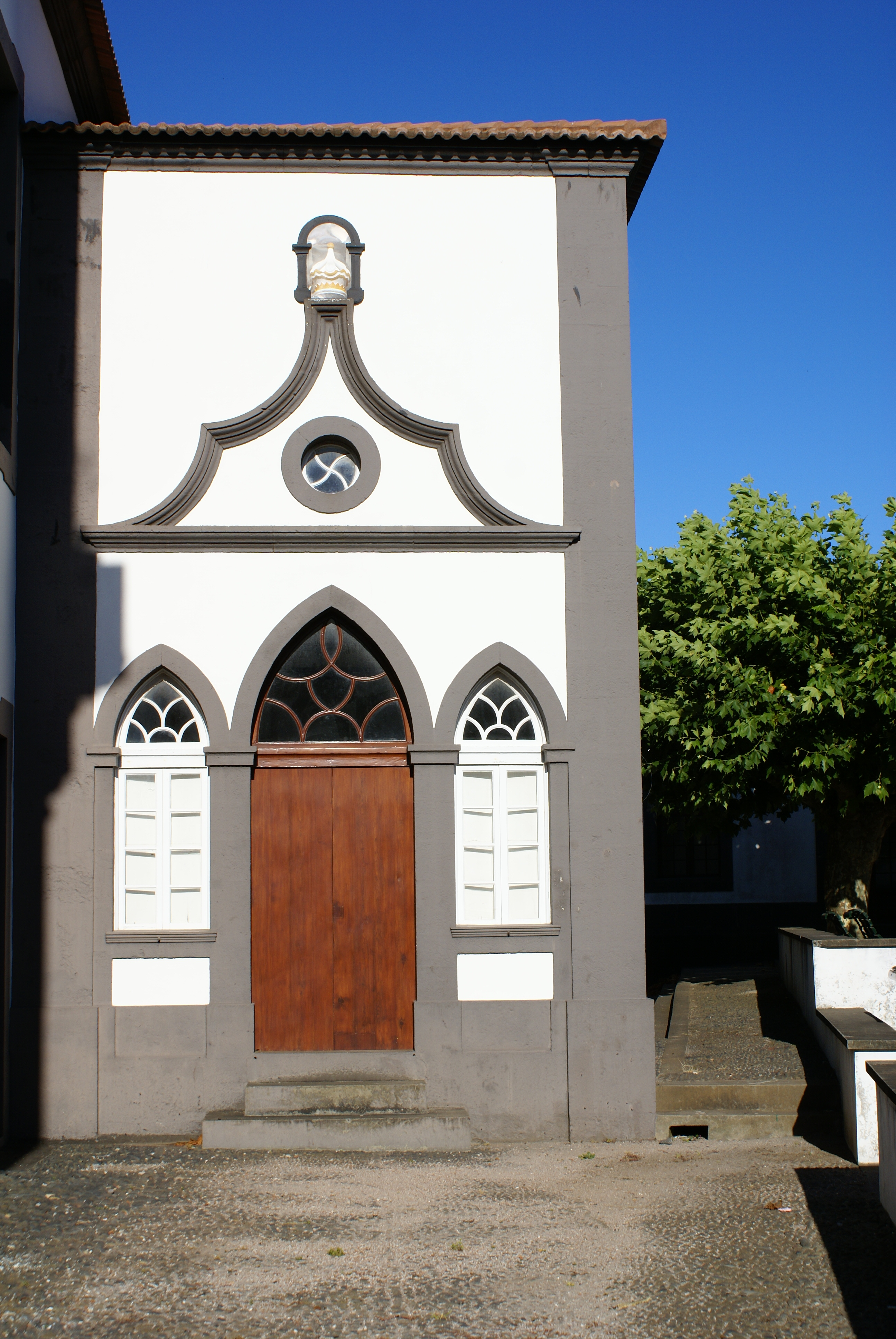 Império do Espirito Santo de São Mateus, vila da Praia, ilha Graciosa, Açores, Portugal